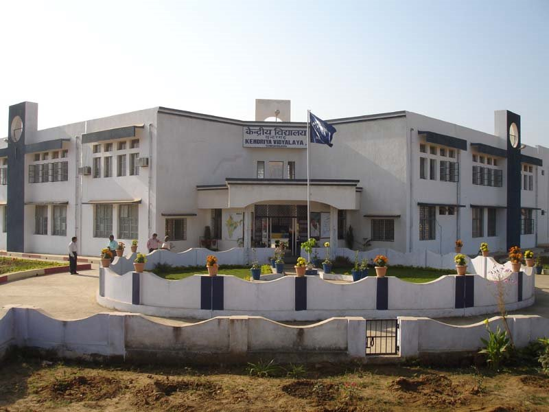 Kendriya Vidyalaya,Sundargarh